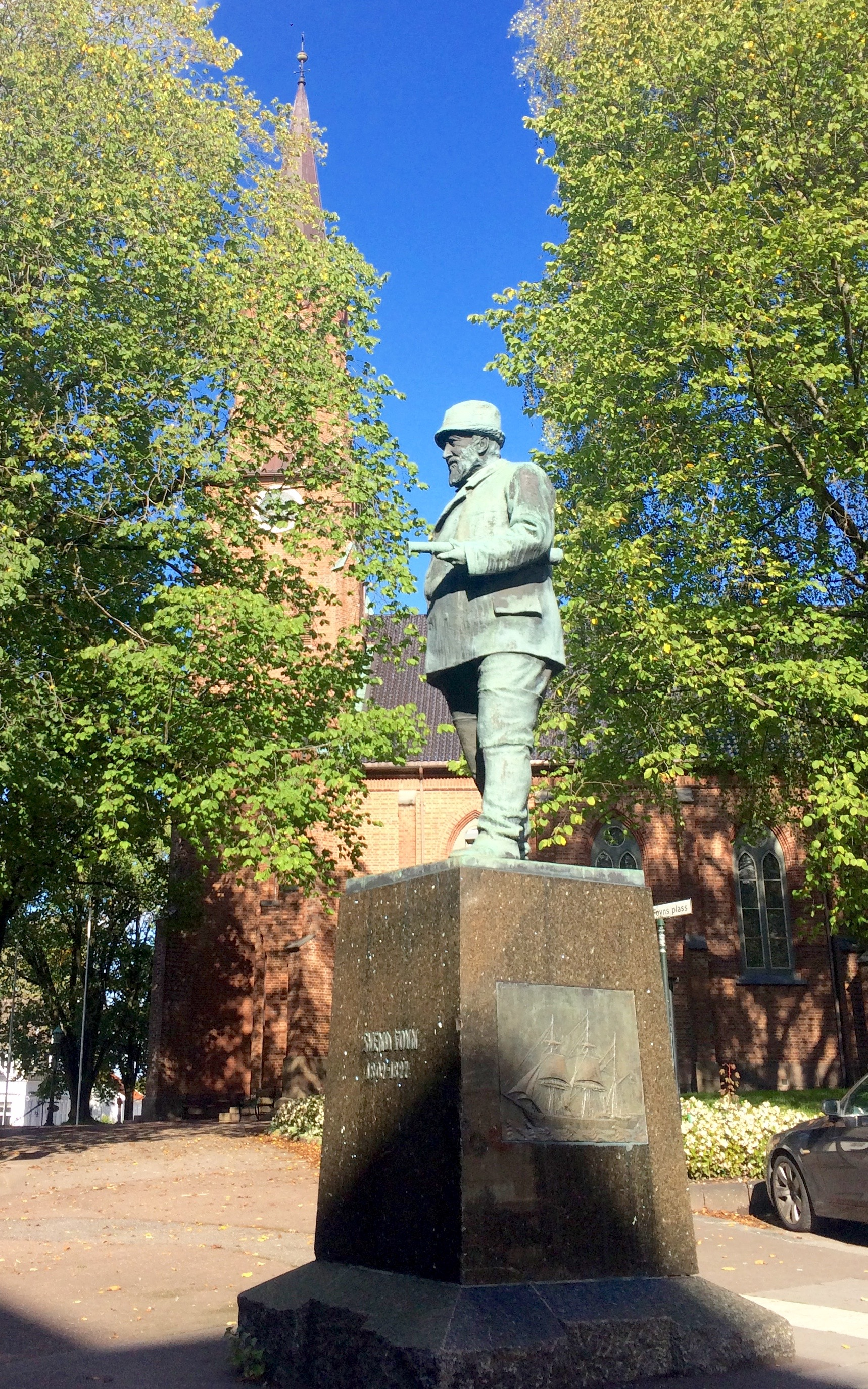 Statue av (1809–1894), grunnleggeren av den moderne hvalfangsten, på Svend Foyns plass ved Tønsberg domkirke i Tønsberg i Vestfold. «Skiænket Tønsberg By av Hvalfangere 1915». Foto 25. september 2015.